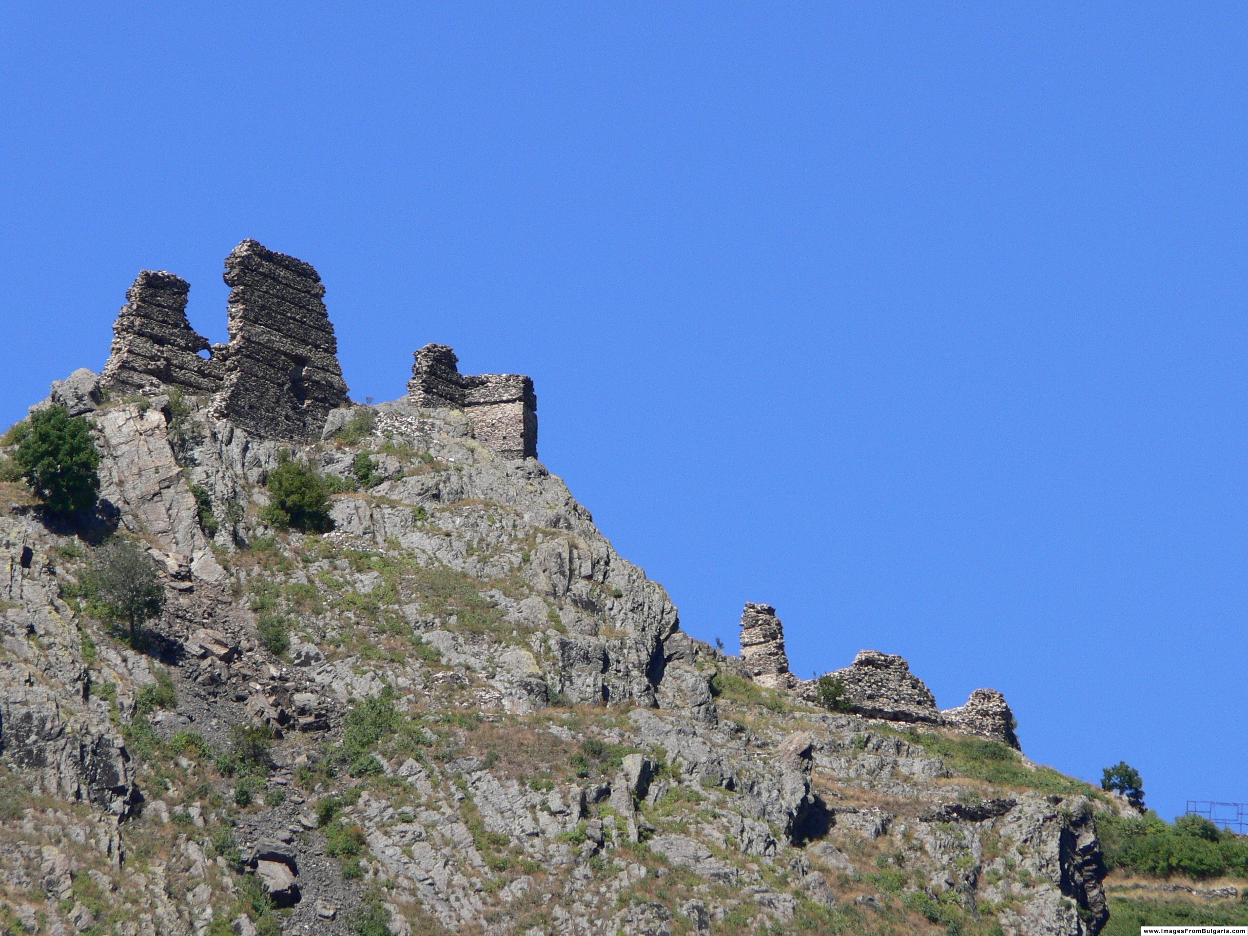 Anevsko Kale, a castle in Bulgaria